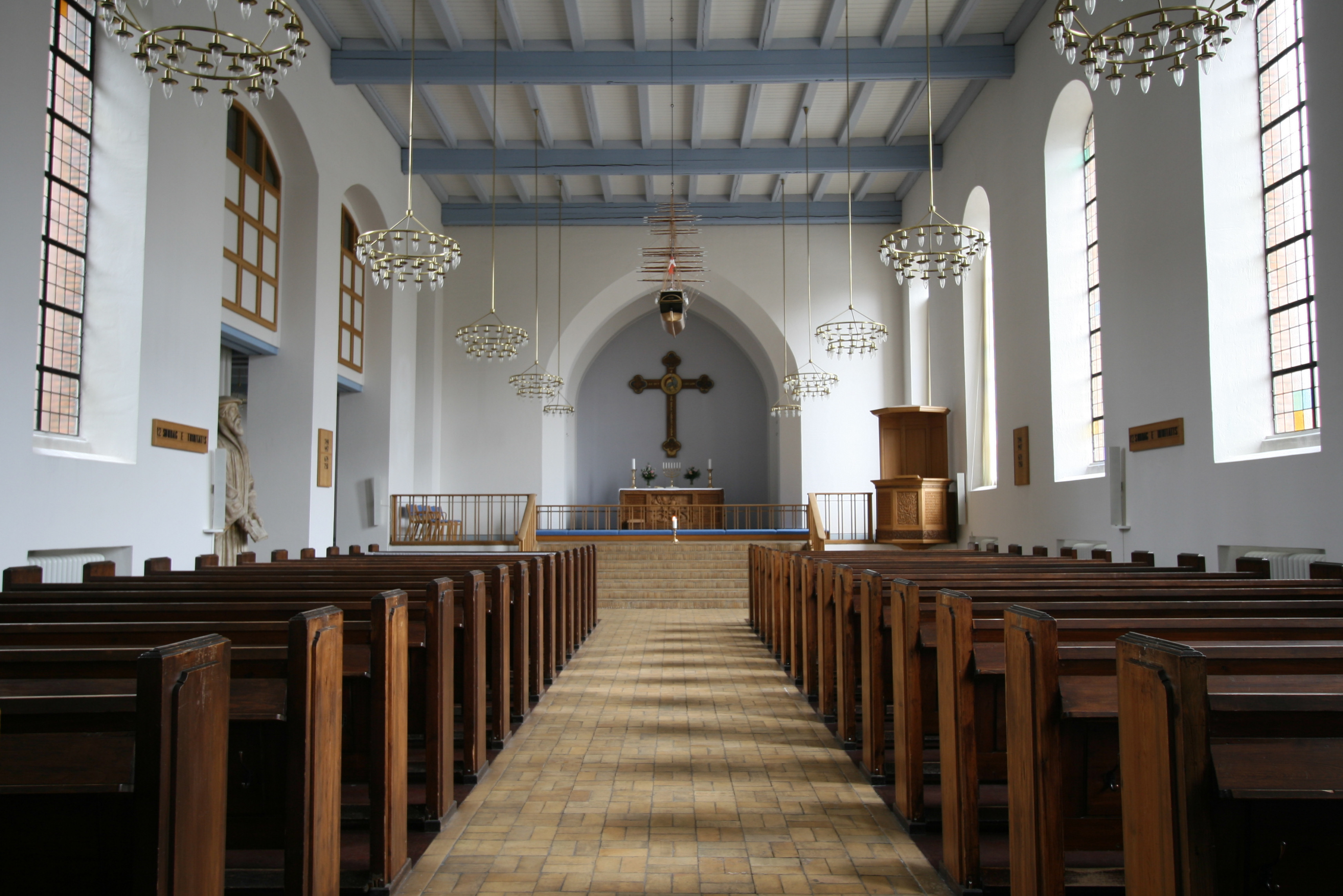 Hans Tausens Kirke, Amager, Copenhagen, Denmark. Interior.